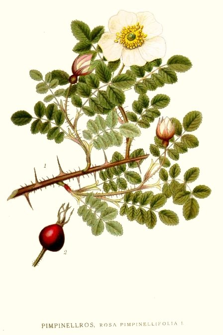 Rosa pimpinellifolia L. Original Description Pimpinellros, Rosa pimpinellifolia L.